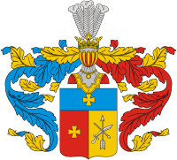 Герб из Общего гербовника дворянских родов Российской империи